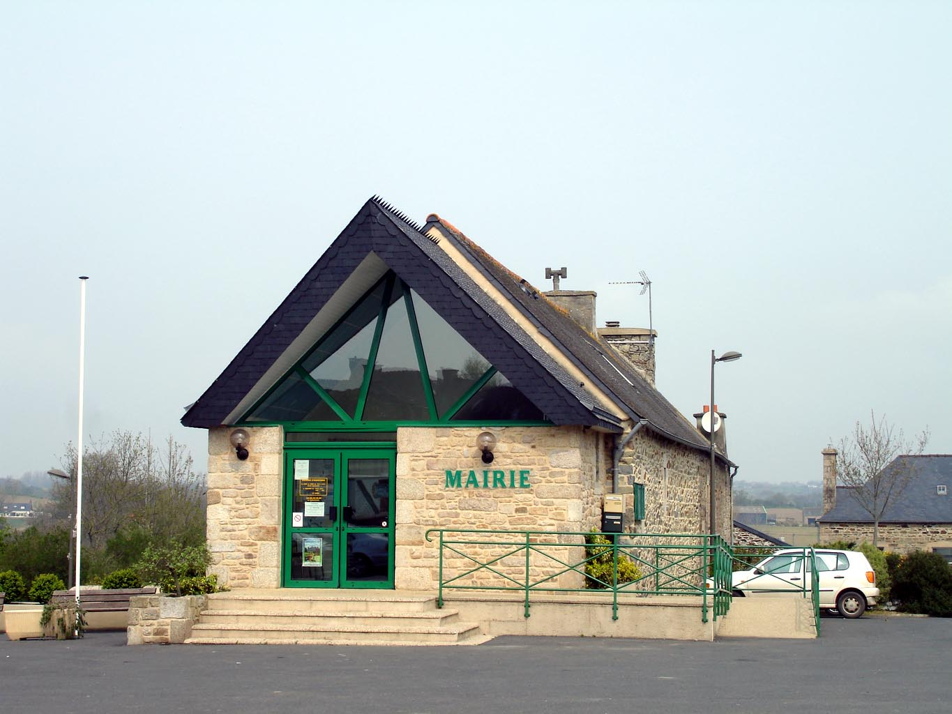 Mairie de Pleudaniel (Côtes-d'Armor), France